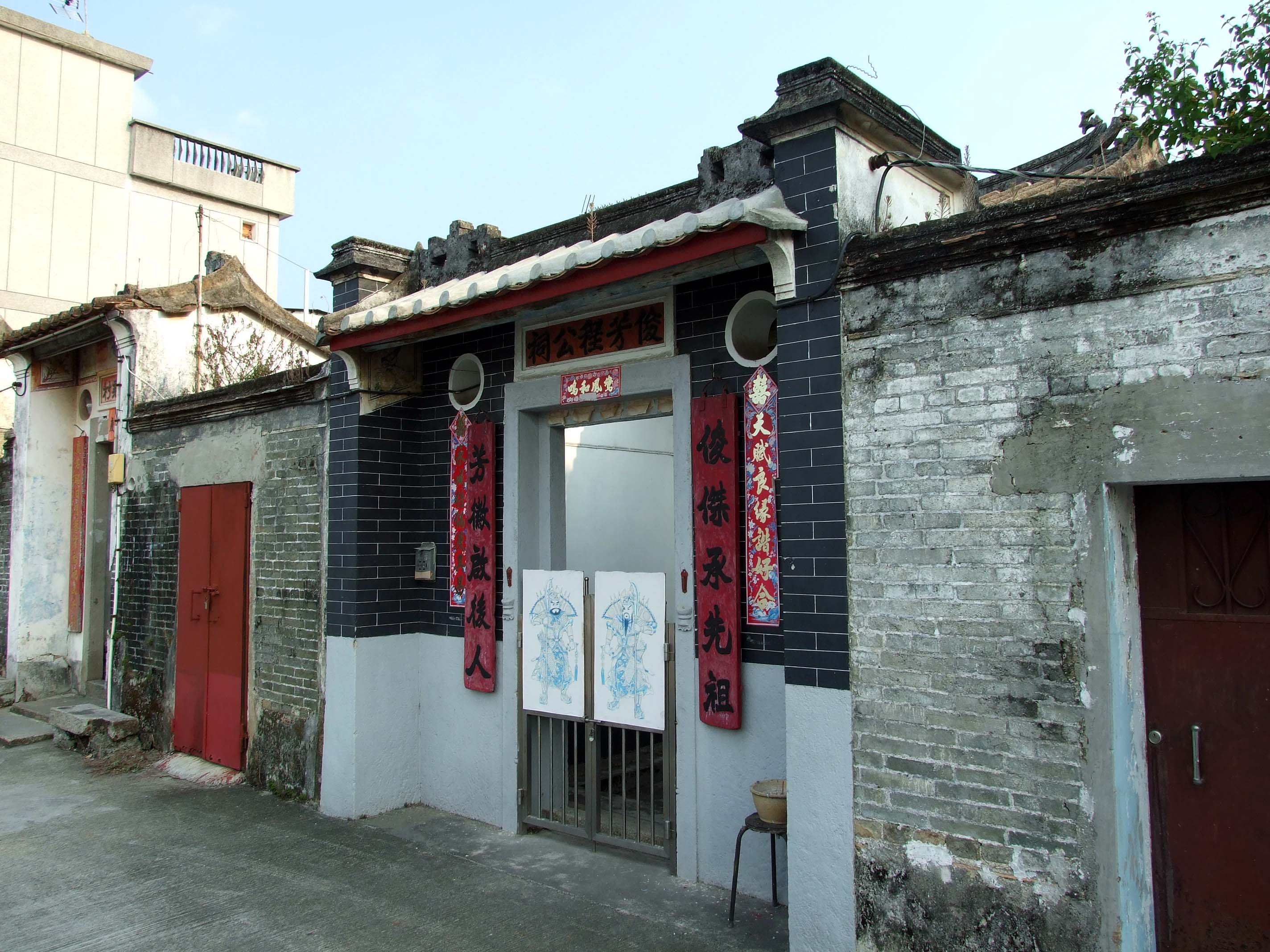 中文（香港）: 十八鄉水蕉新村俊芳程公祠